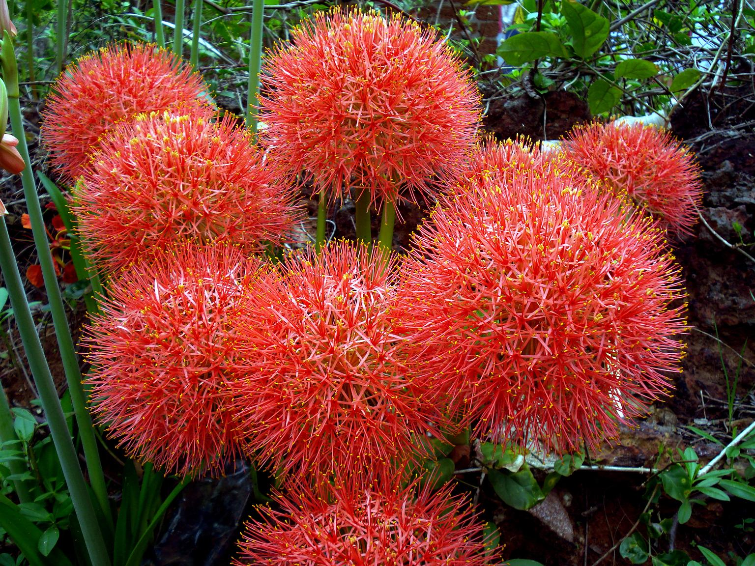 ലില്ലിപൂക്കൾ